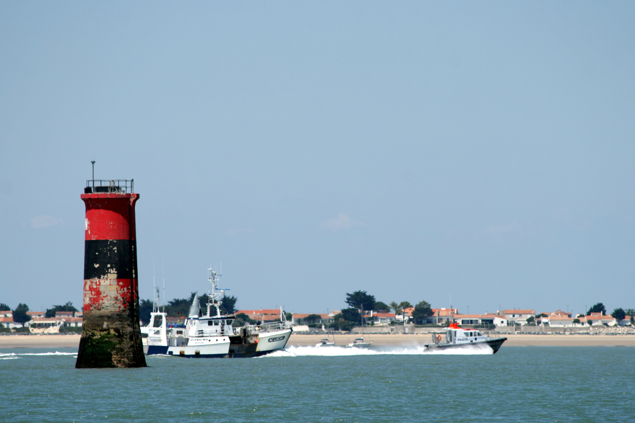 Le phare du Lavardin devant la plage de Sablanceau